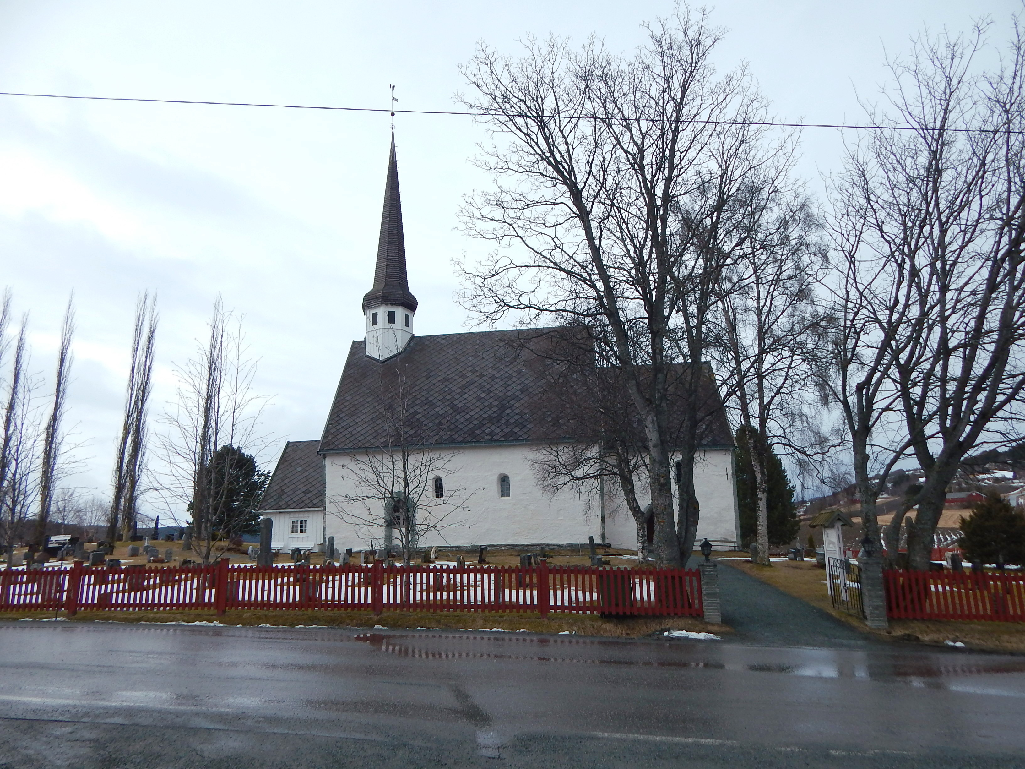 Skaun kirke med fylkesvei 754 foran